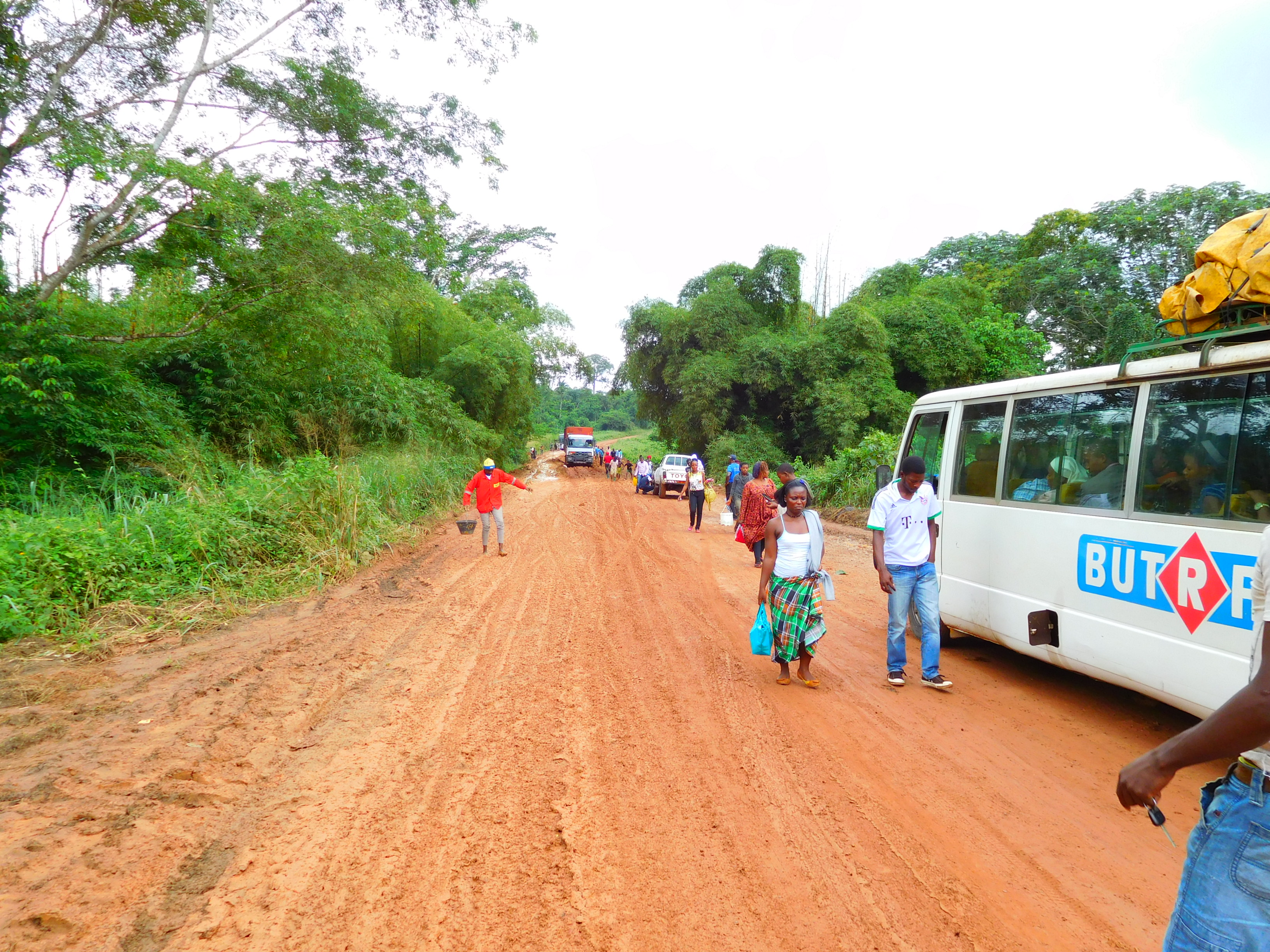 Cameroun : la route nationale 3 reliant Yaoundé à Douala, près de l'embranchement vers Eséka, à la saison des pluies.